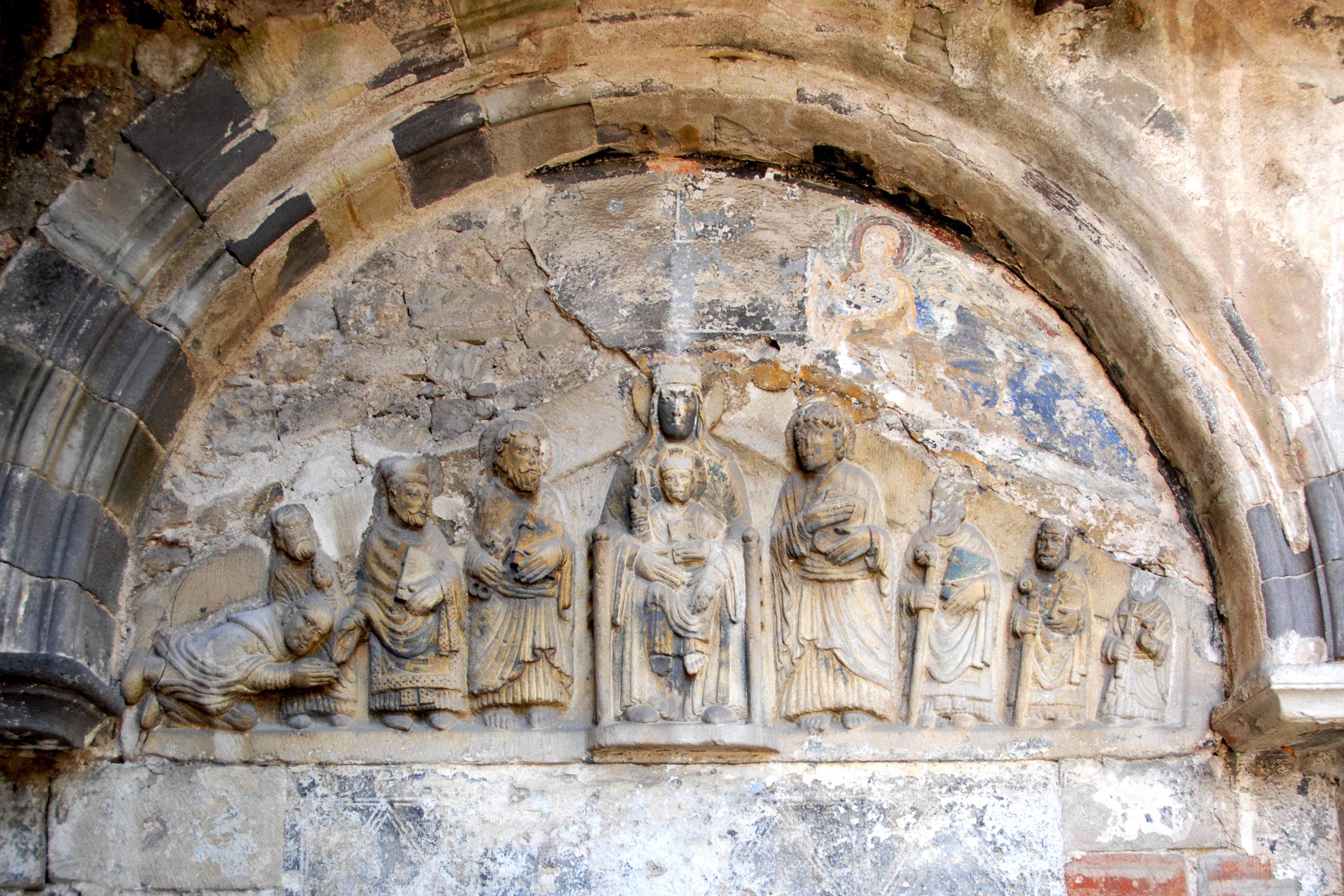 Mozat, südl. Querhaus, Portalsturz